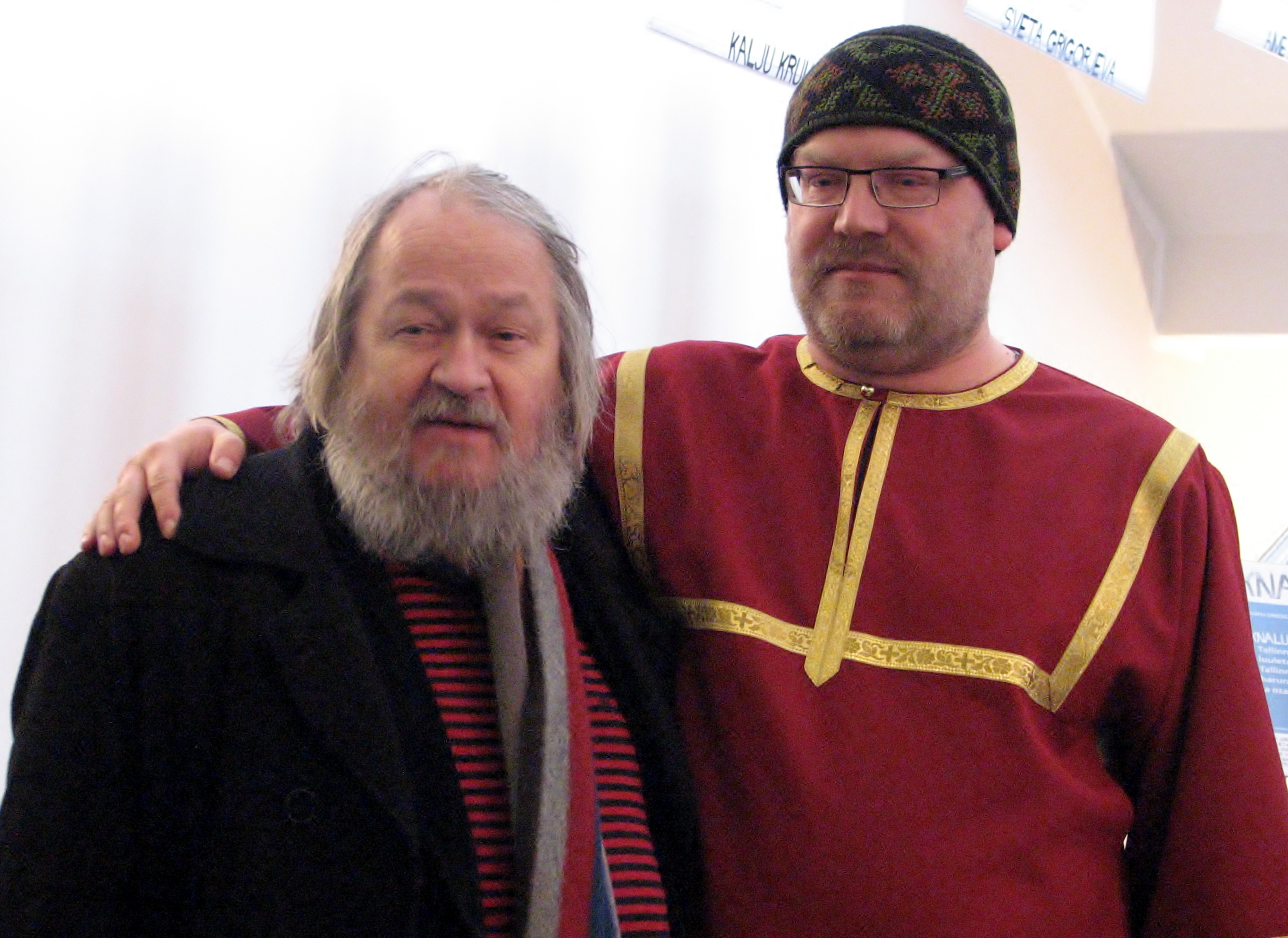 Leonhard Lapin ja (:)kivisildnik esinemas rahvusvahelise luulepäeva luulemaratonil Tallinna Keskraamatukogus 21. märtsil 2014